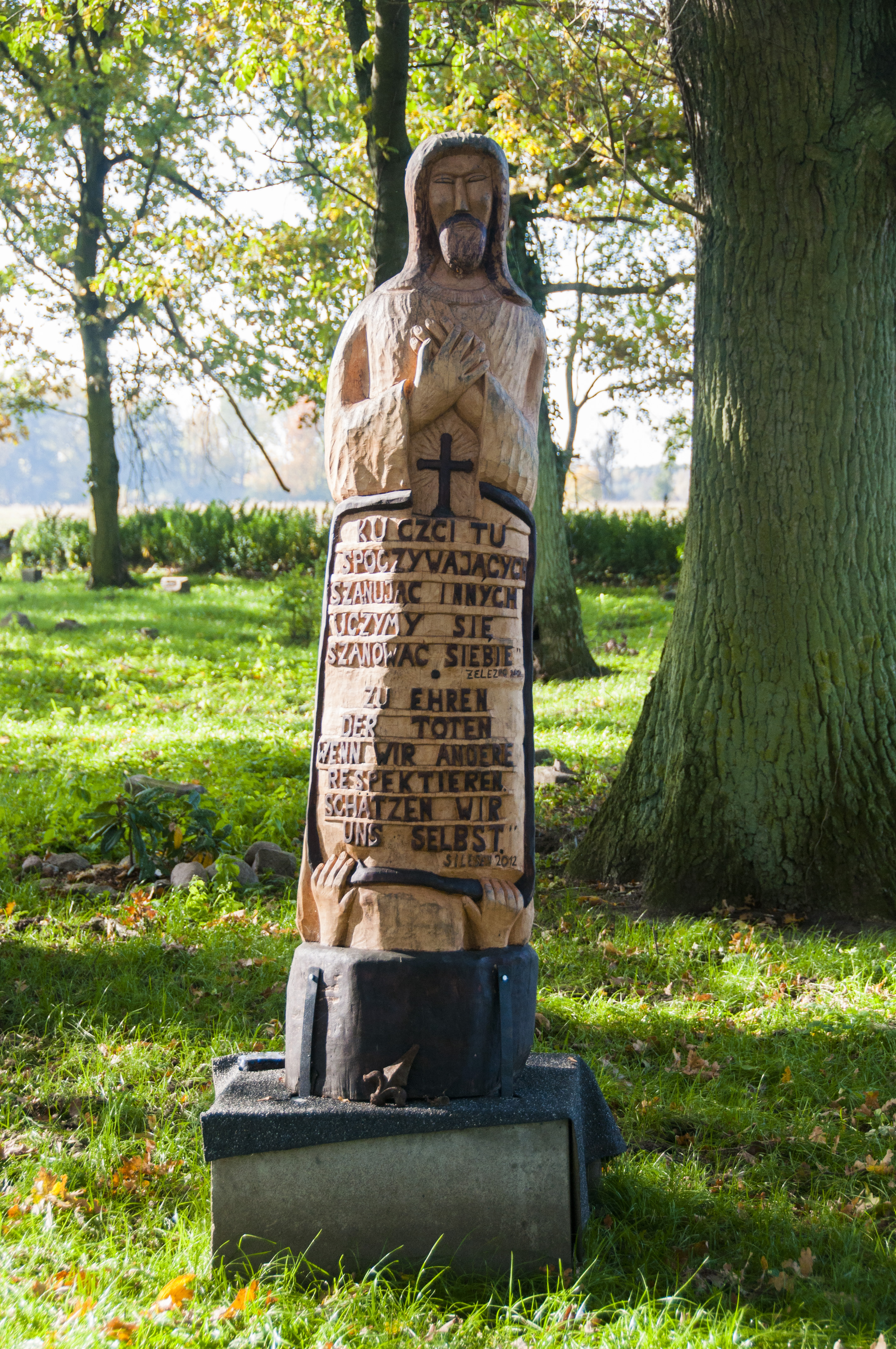 Pomnik na cmentarzu w Żeleźnie upamiętniający pochowanych tam niemców.